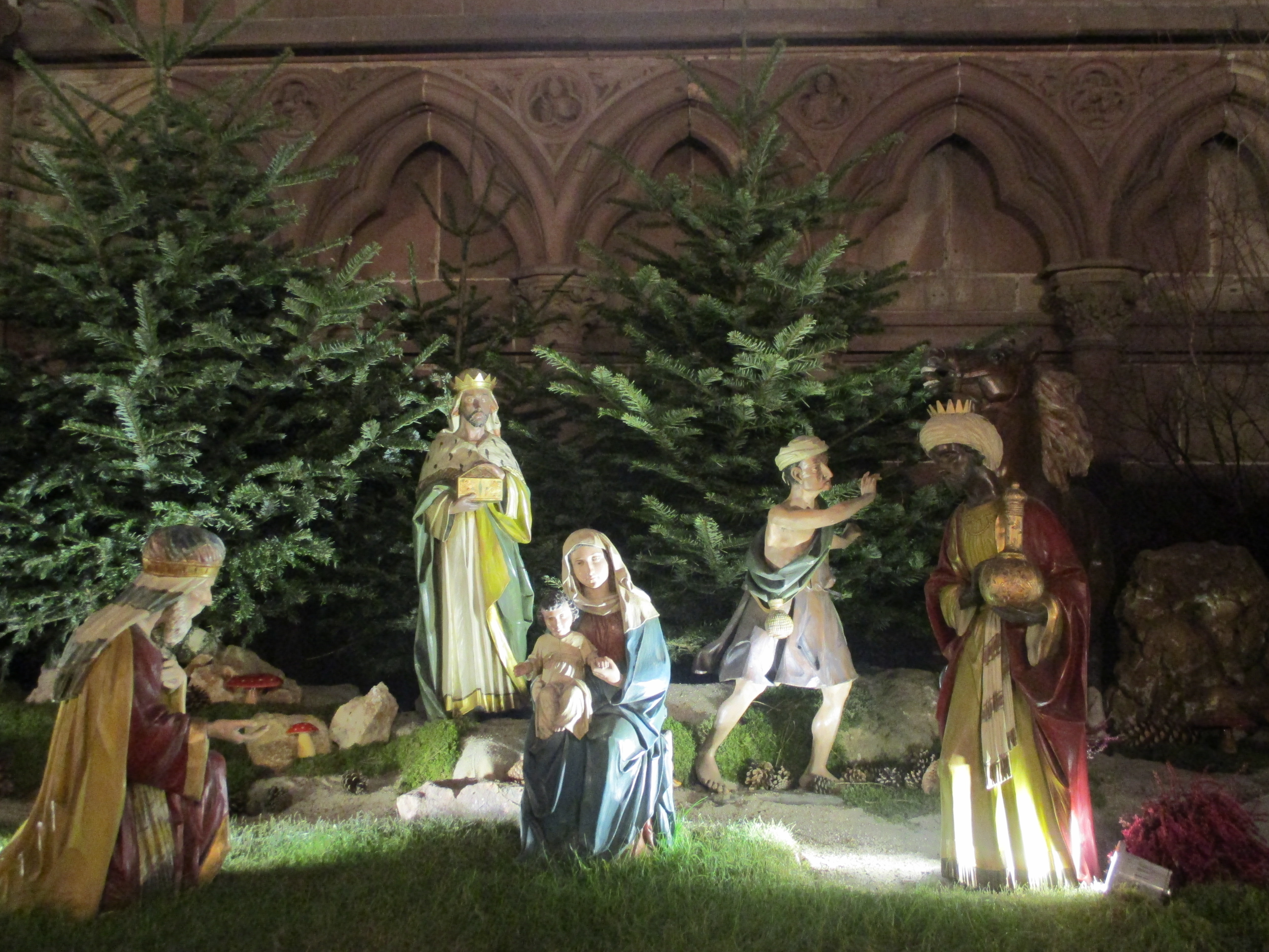 Crèche de la cathédrale Notre-Dame de Strasbourg, janvier 2017.